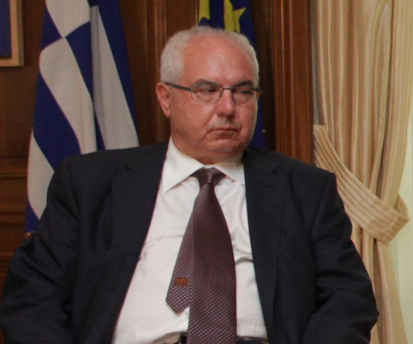 Aristos Kasmiroglou